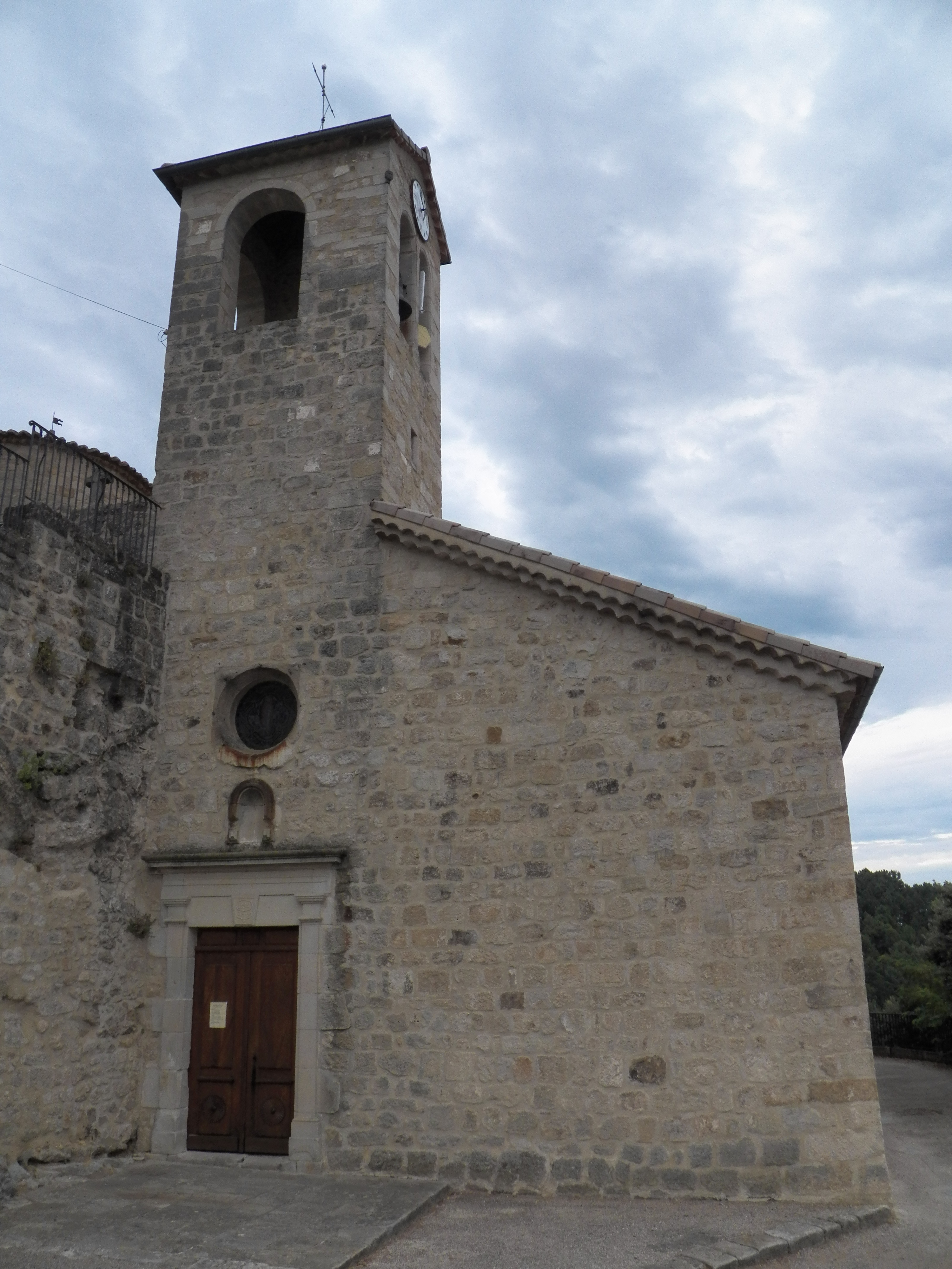 L'église Saint Michel à Vernon, dominant la vallée de la Beaume..